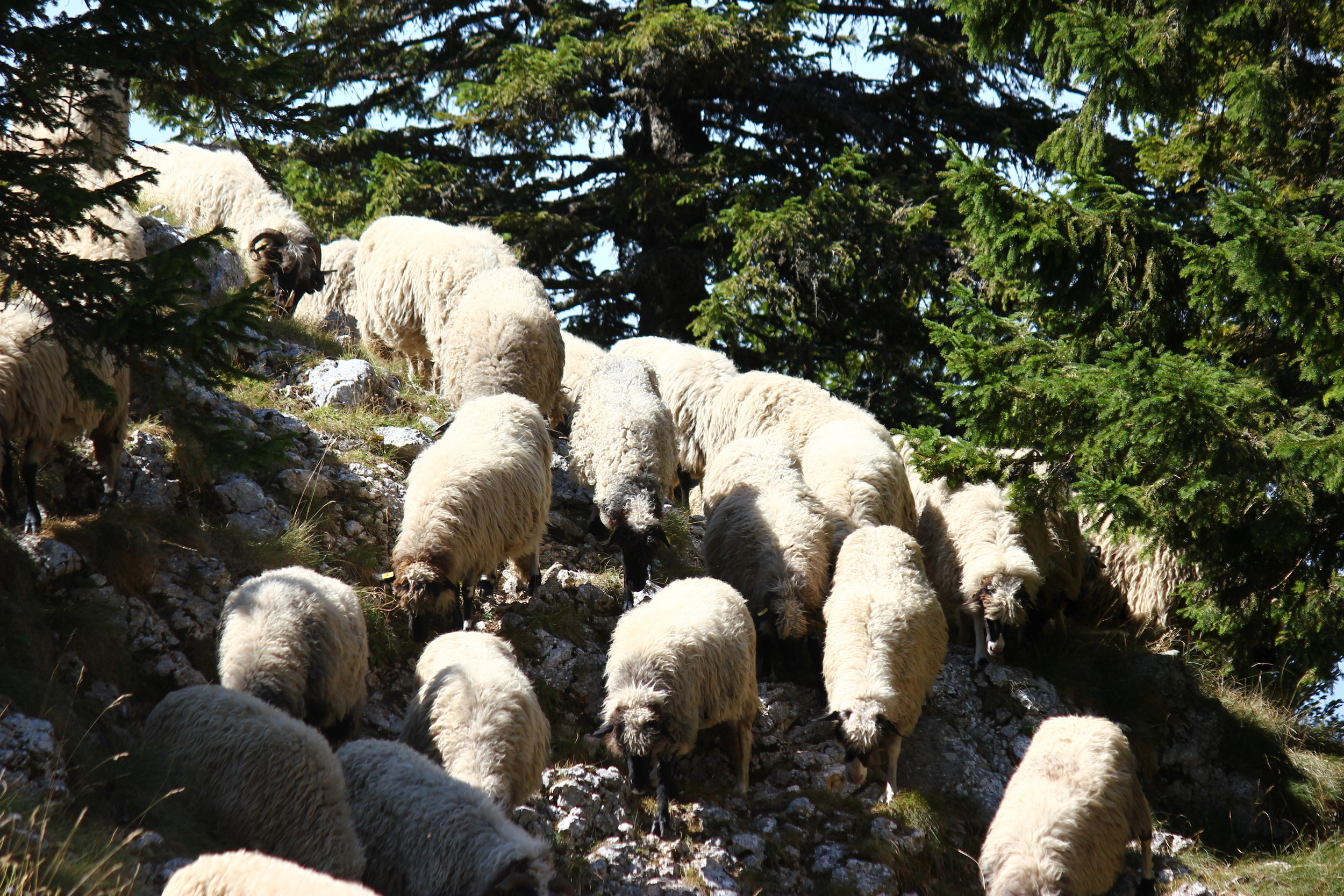 Schafe auf dem Vlašić.